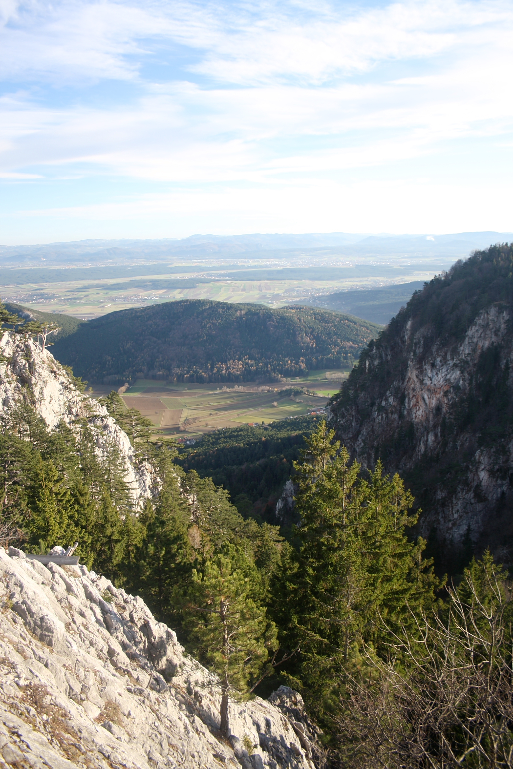 Der Leitergraben an der Südwestseite der Hohen Wand in Niederösterreich (zwischen dem Hochkogel- und Hubertushaus). In der Bildmitte der 650 Meter hohe Kienberg.